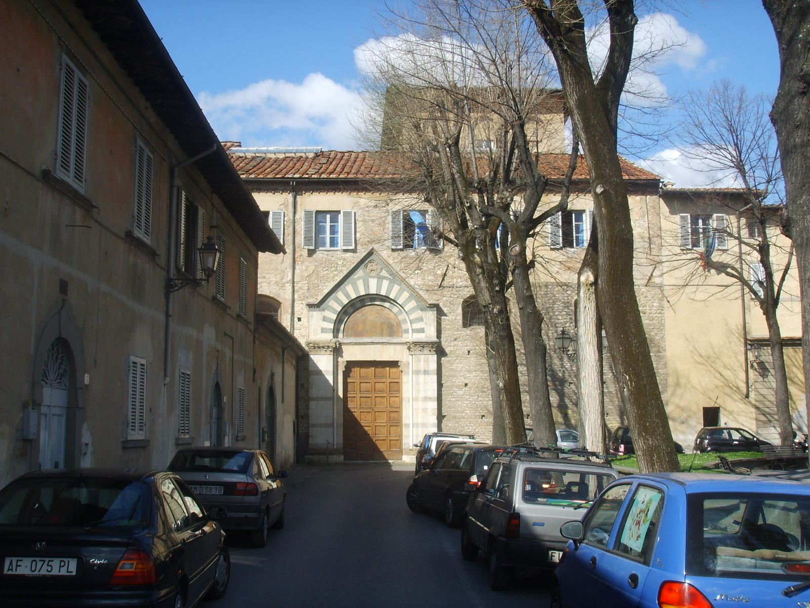 Convento_di_San_Niccolò